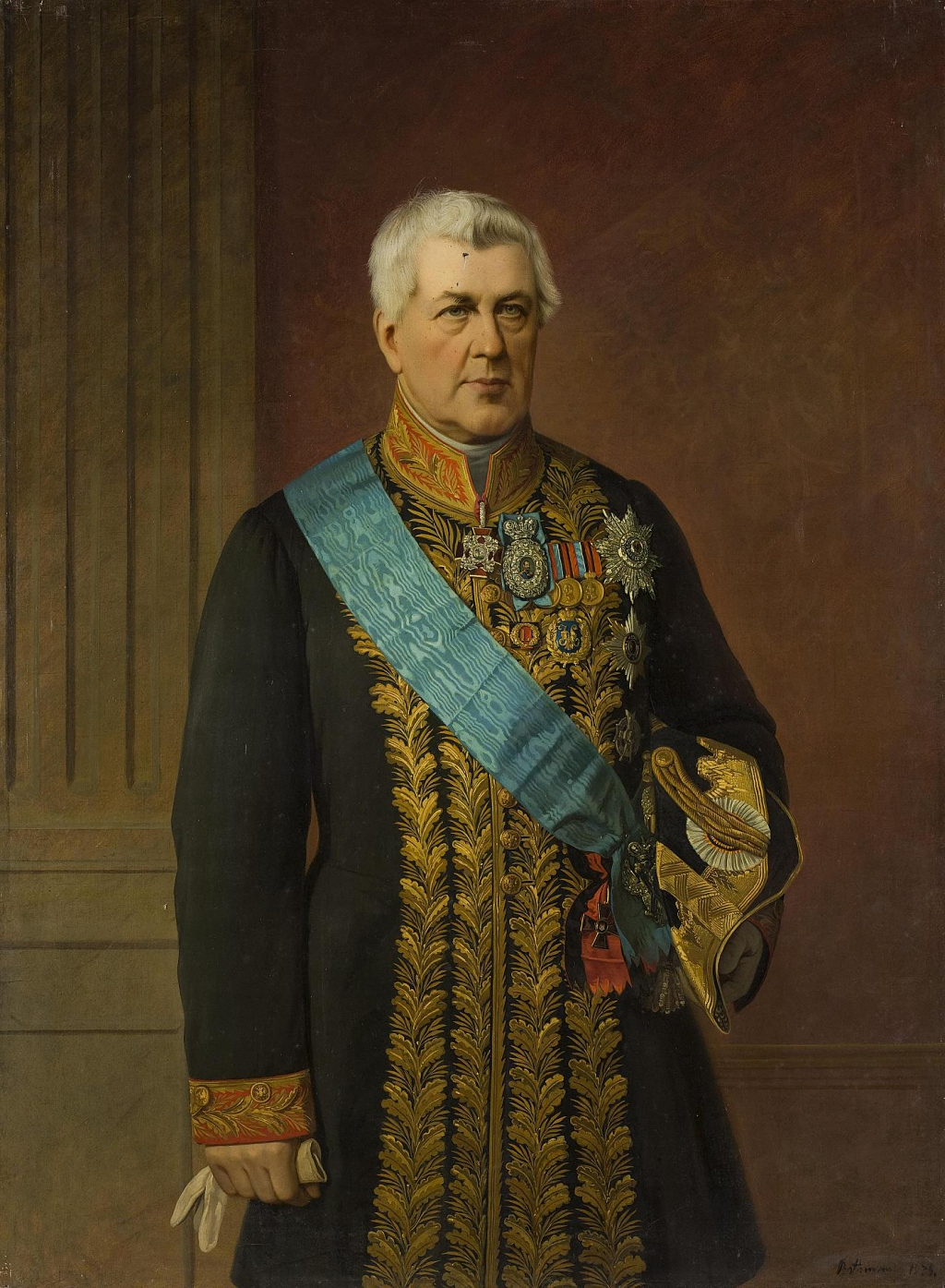 Картина «Портрет Виктора Никитича Панина» — художник Егор (Георг) Иванович Ботман, русский придворный живописец, портретист, академик Императорской Академии художеств.